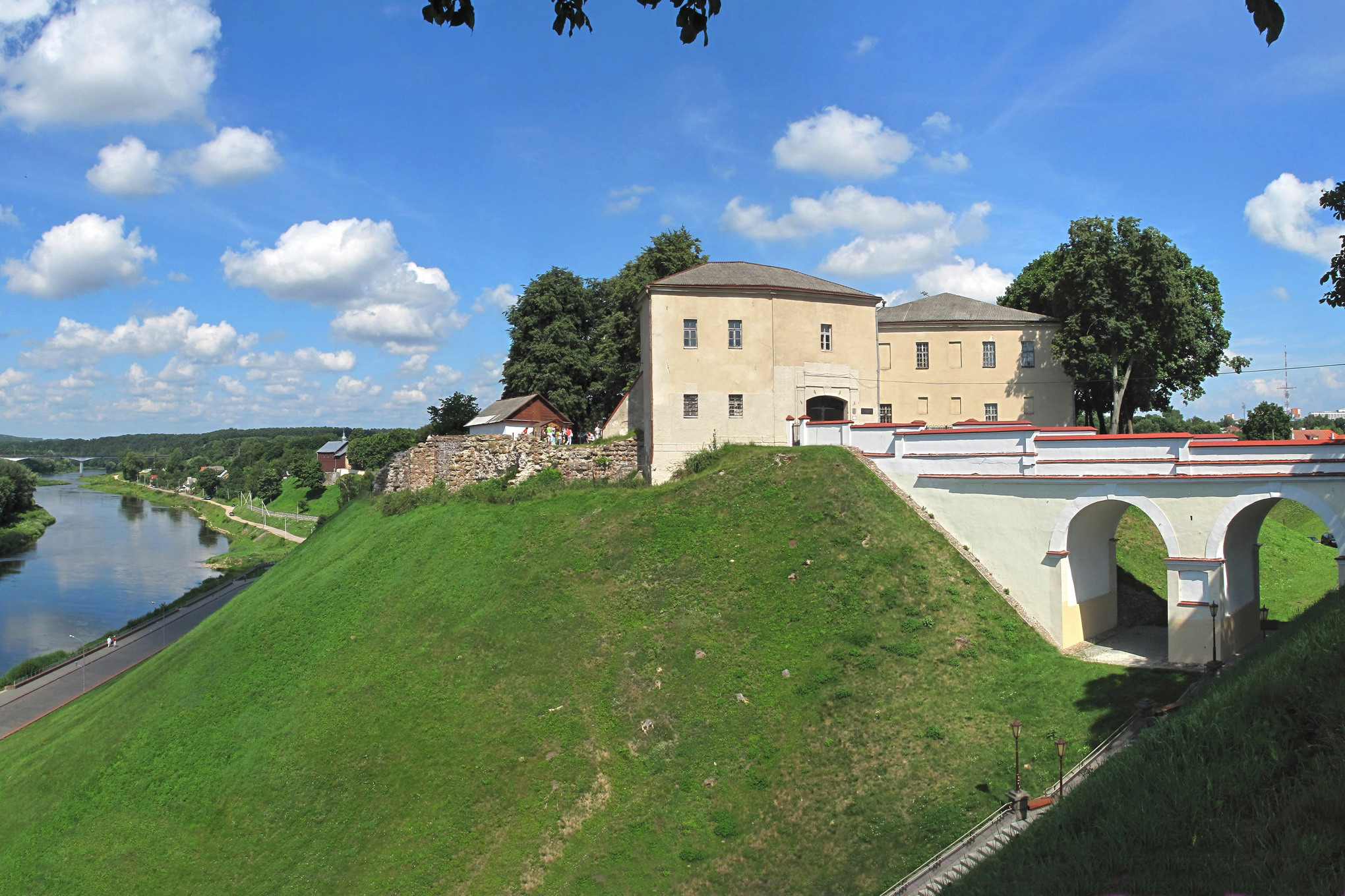 Вид на Старый замок от Нового